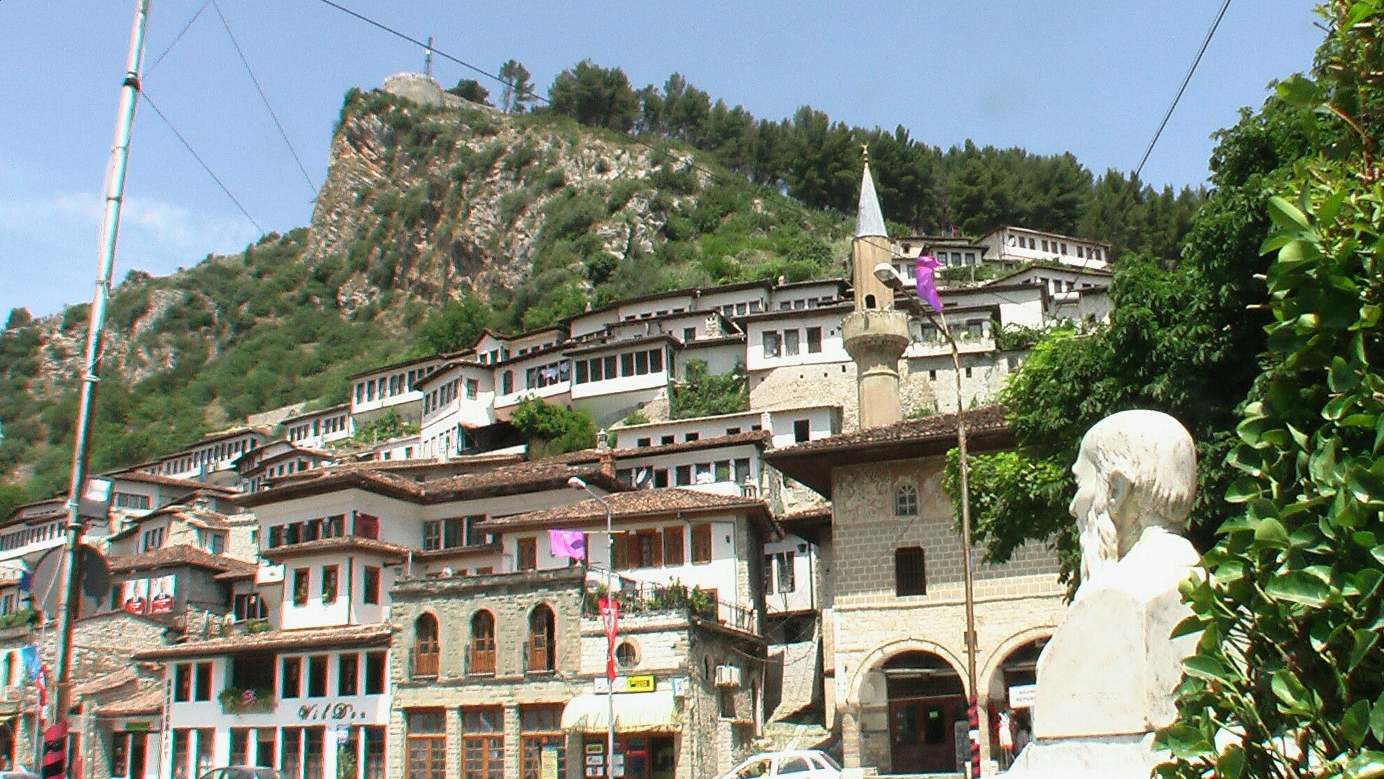 BeratAnsicht2